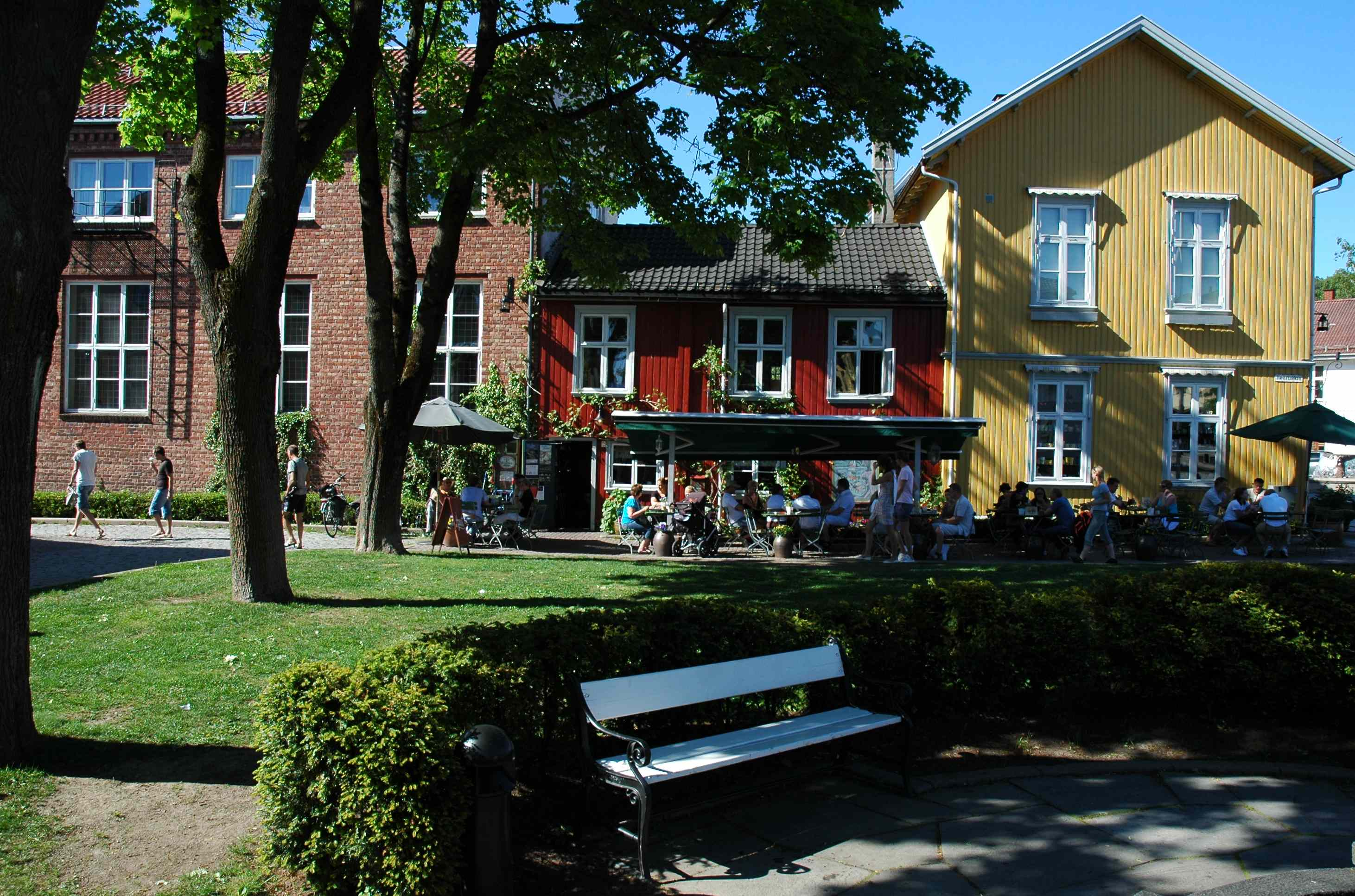 Det gamle bageri er et populært spisested ved torget i Drøbak.